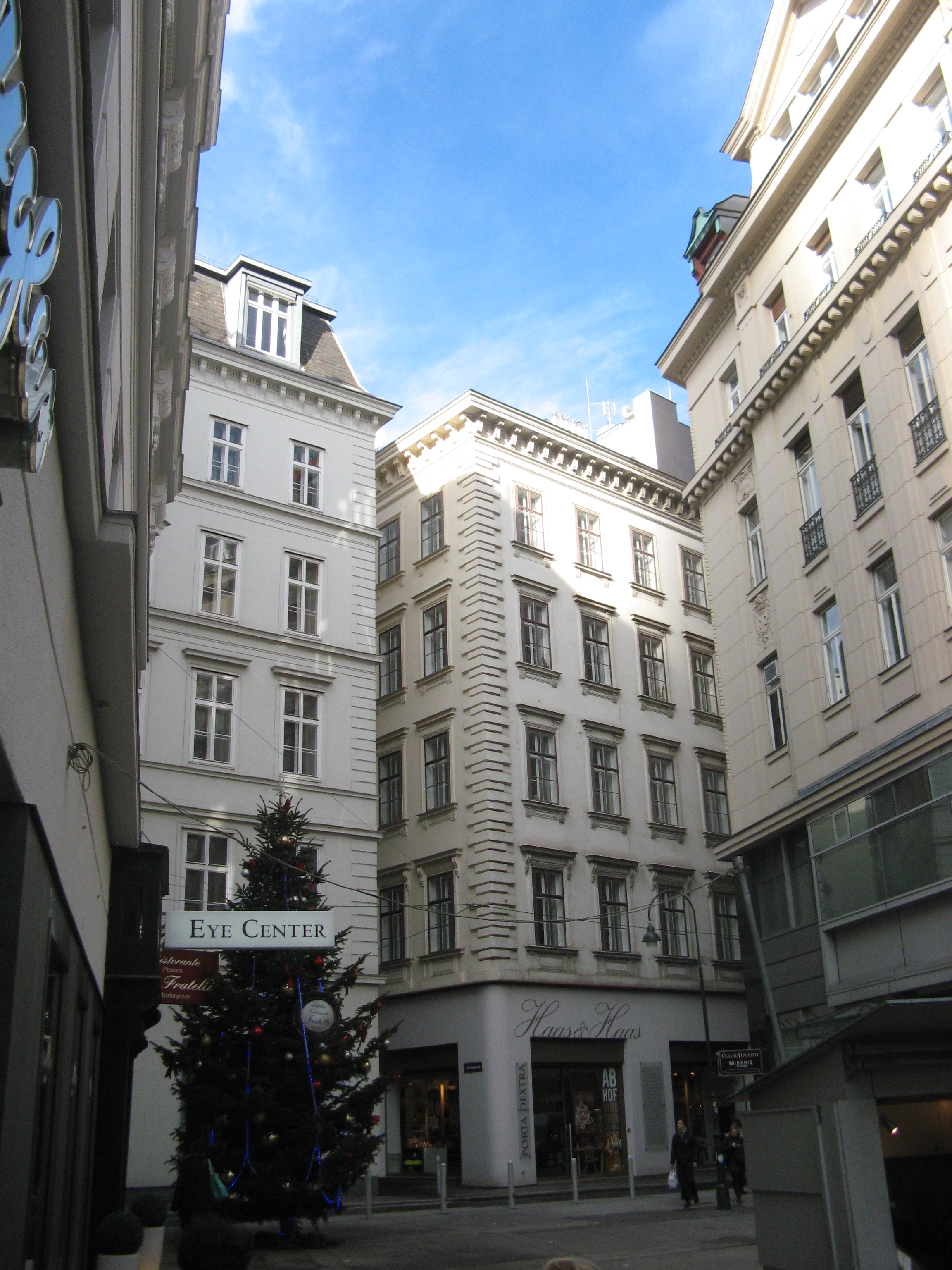 Ertlgasse von der Rotenturmstraße aus, Wien-Innere Stadt